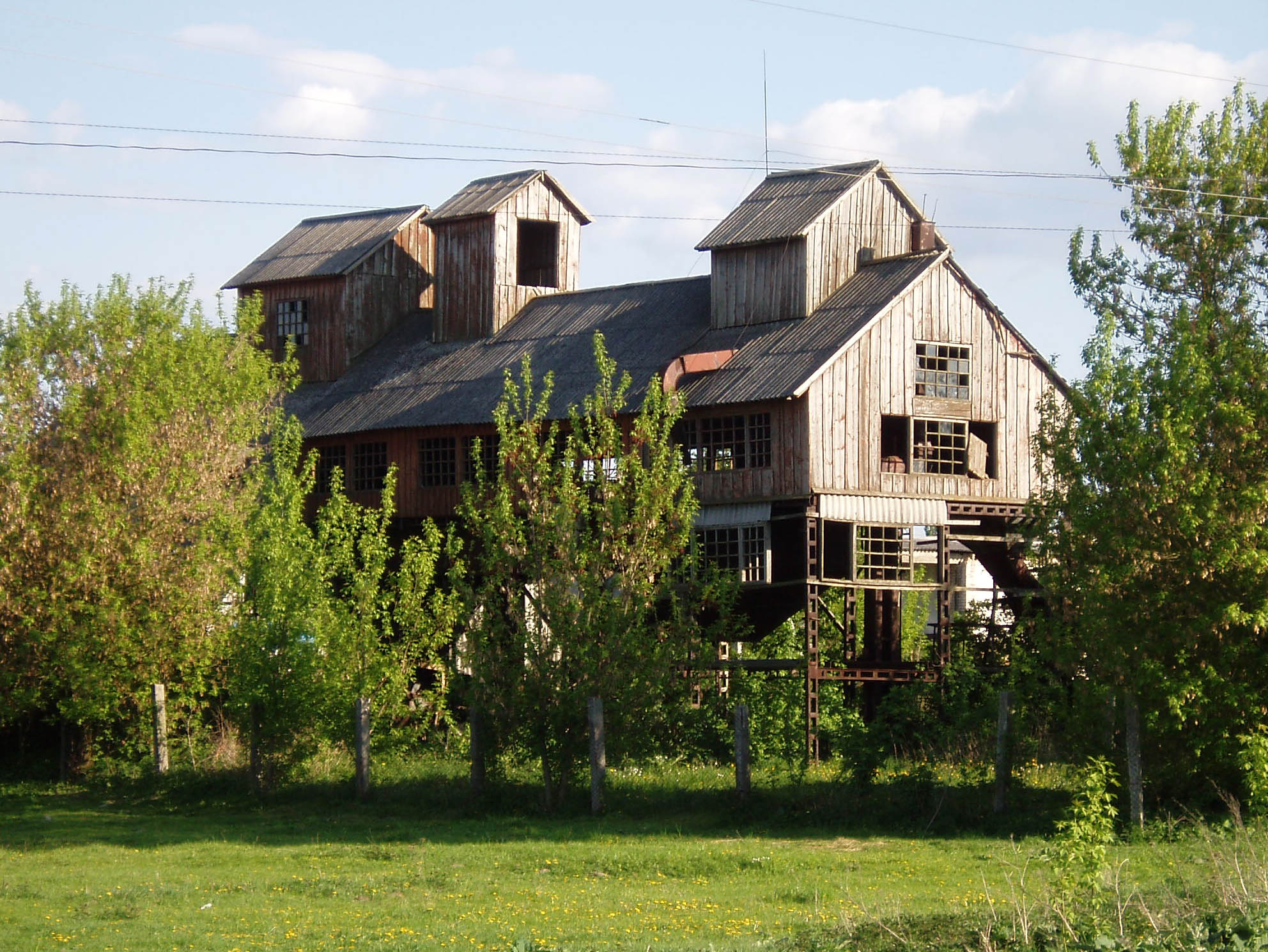 Село Затурці.